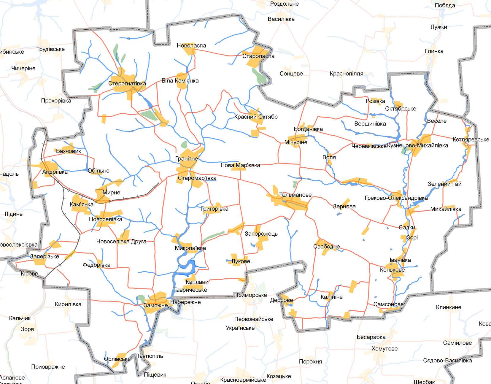 Map